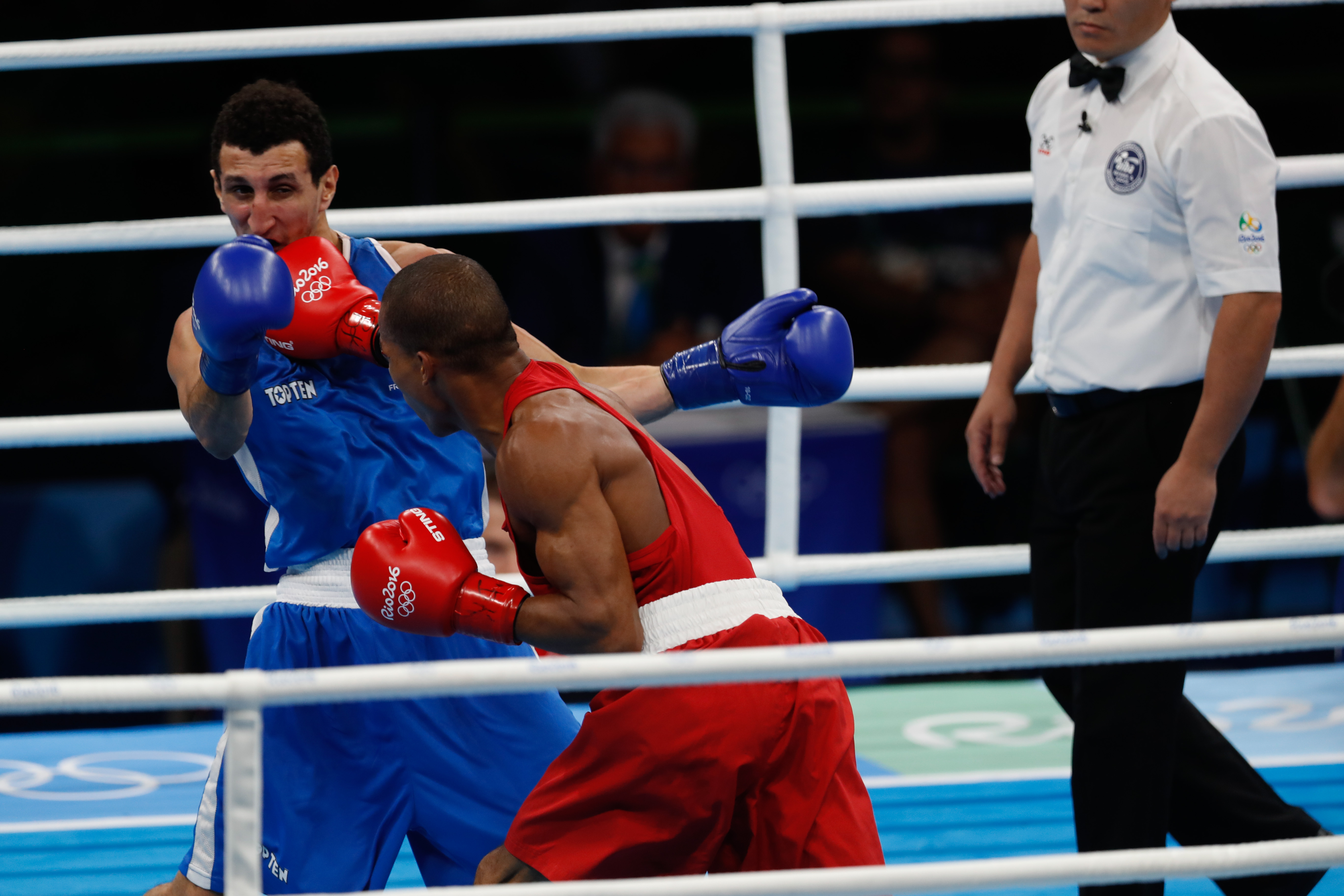 Rio de Janeiro - Por decisão unânime dos juízes, o lutador brasileiro Robson Conceição derrotou o francês Sofiane Oumiha e garantiu o ouro na categoria peso ligeiro, até 60 quilos (Fernando Frazão/Agência Brasil)